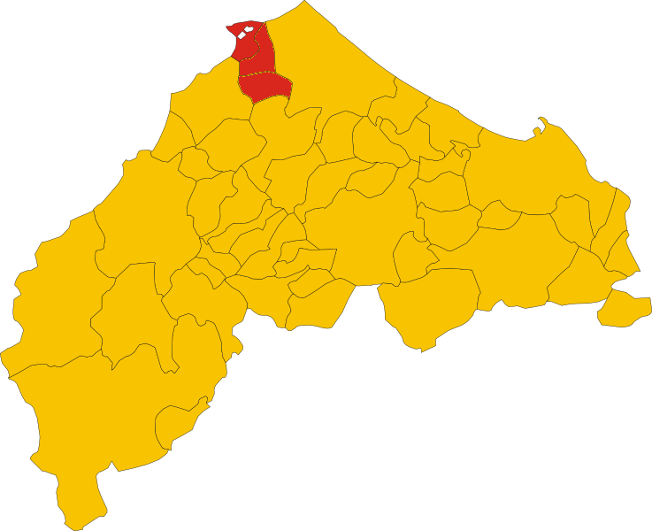 Mappa del comune di Trecastelli (provincia di Ancona, regione Marche, Italia)